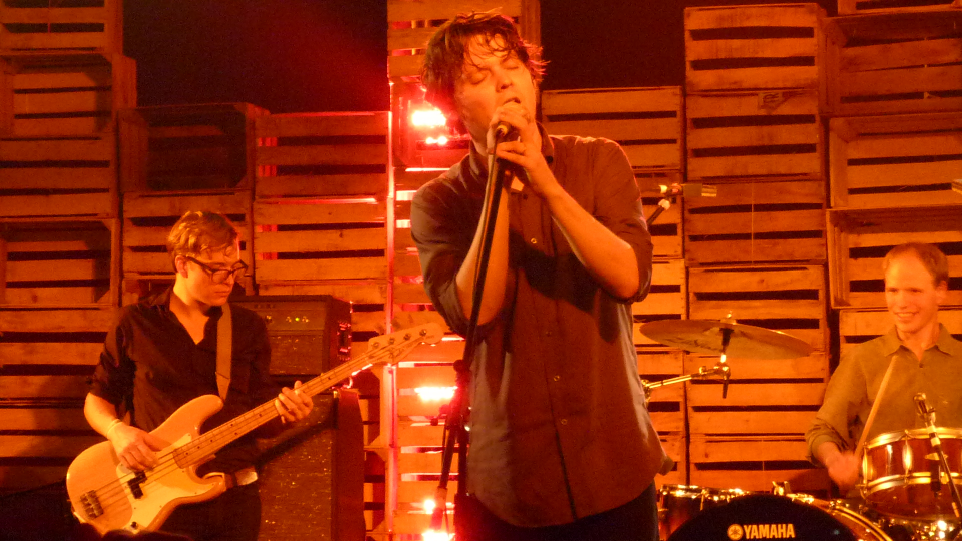 Beirut en concierto en México.